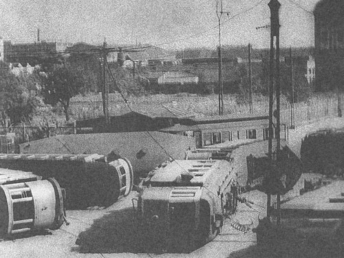 Zdjęcie barykady z tramwajów w sierpniu 1944. Zdjęcie w kierunku południowym na skrzyżowanie ul. Młynarskiej z ul. Wolską. W tle zajezdnia tramwajowa